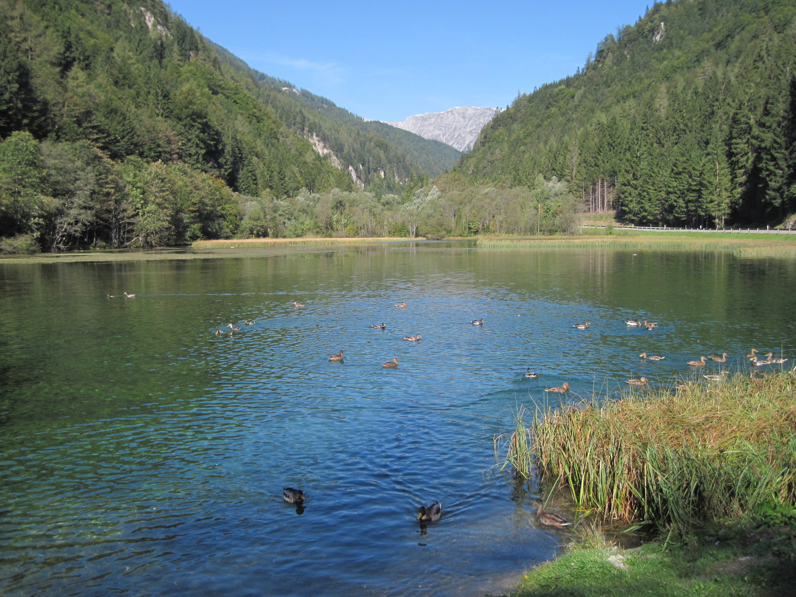 Grüner See am nördlichen Ortsausgang von Au